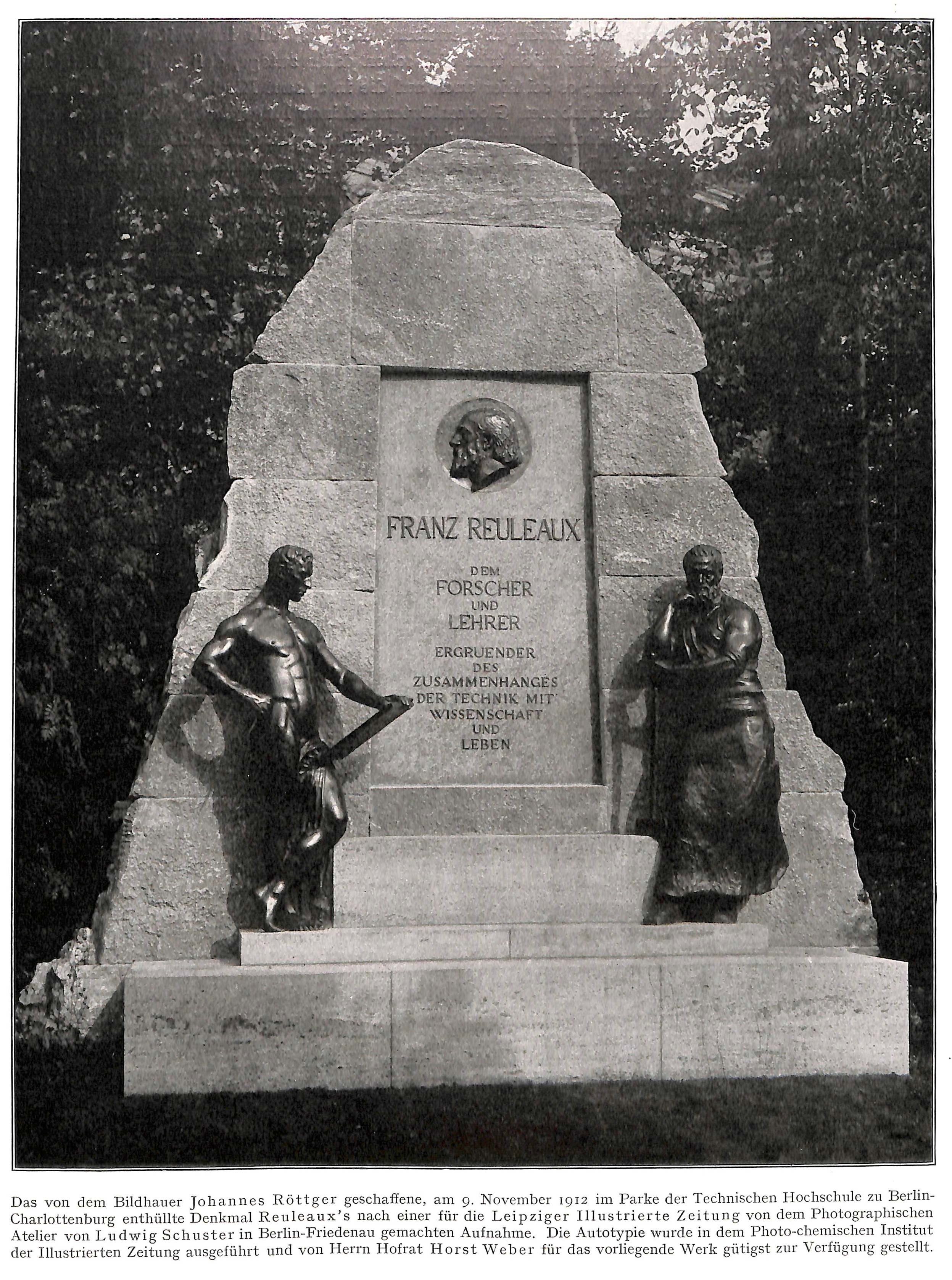 Das im November 1912 eingeweihte Franz-Reuleaux-Denkmal im Park der Hochschule in Berlin-Charlottenburg, in seiner ursprünglichen Gestaltung.